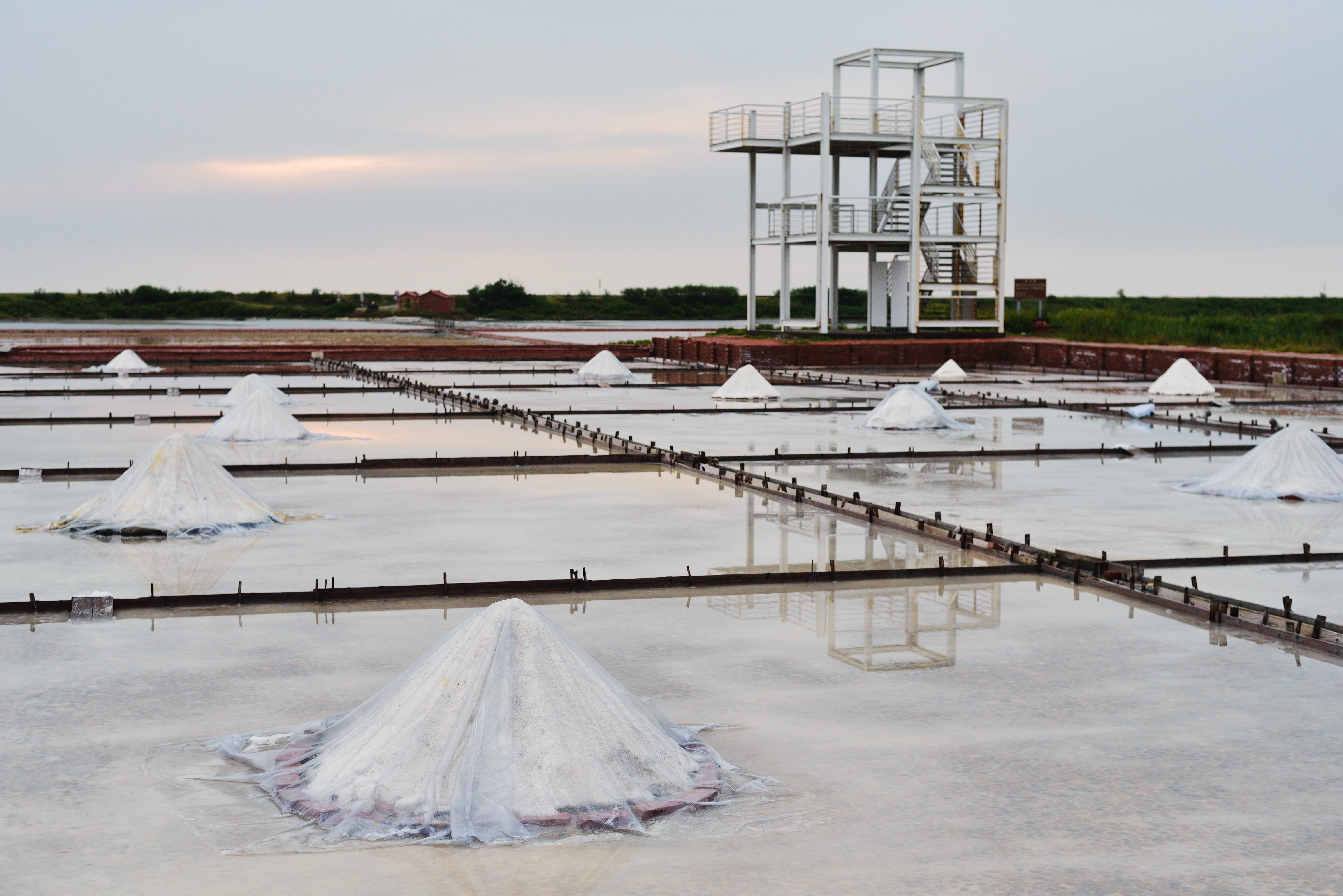 13-台南北門塩田